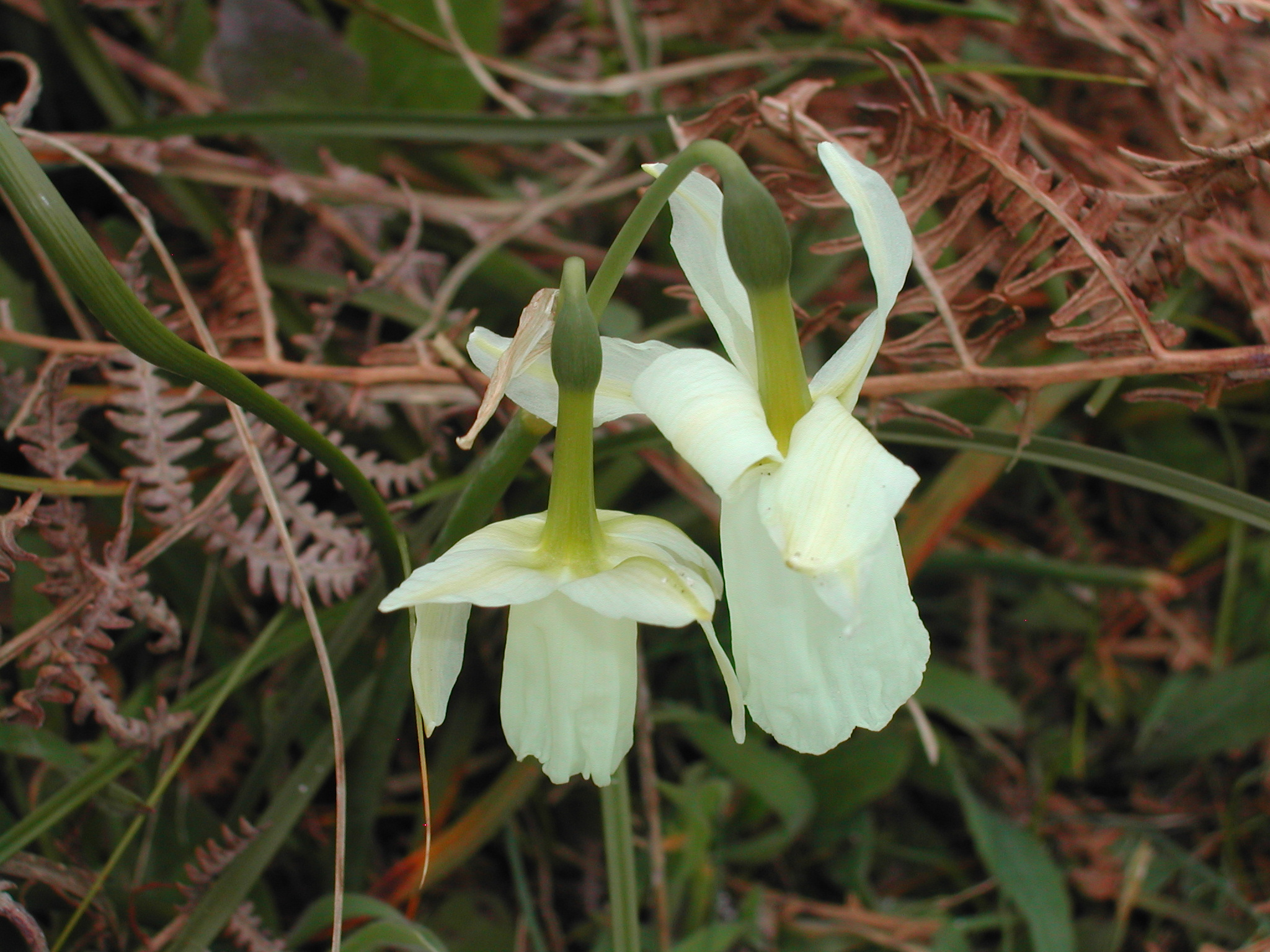 Narcissus triandrus var. loiseleurii. Narcisse des Glénan